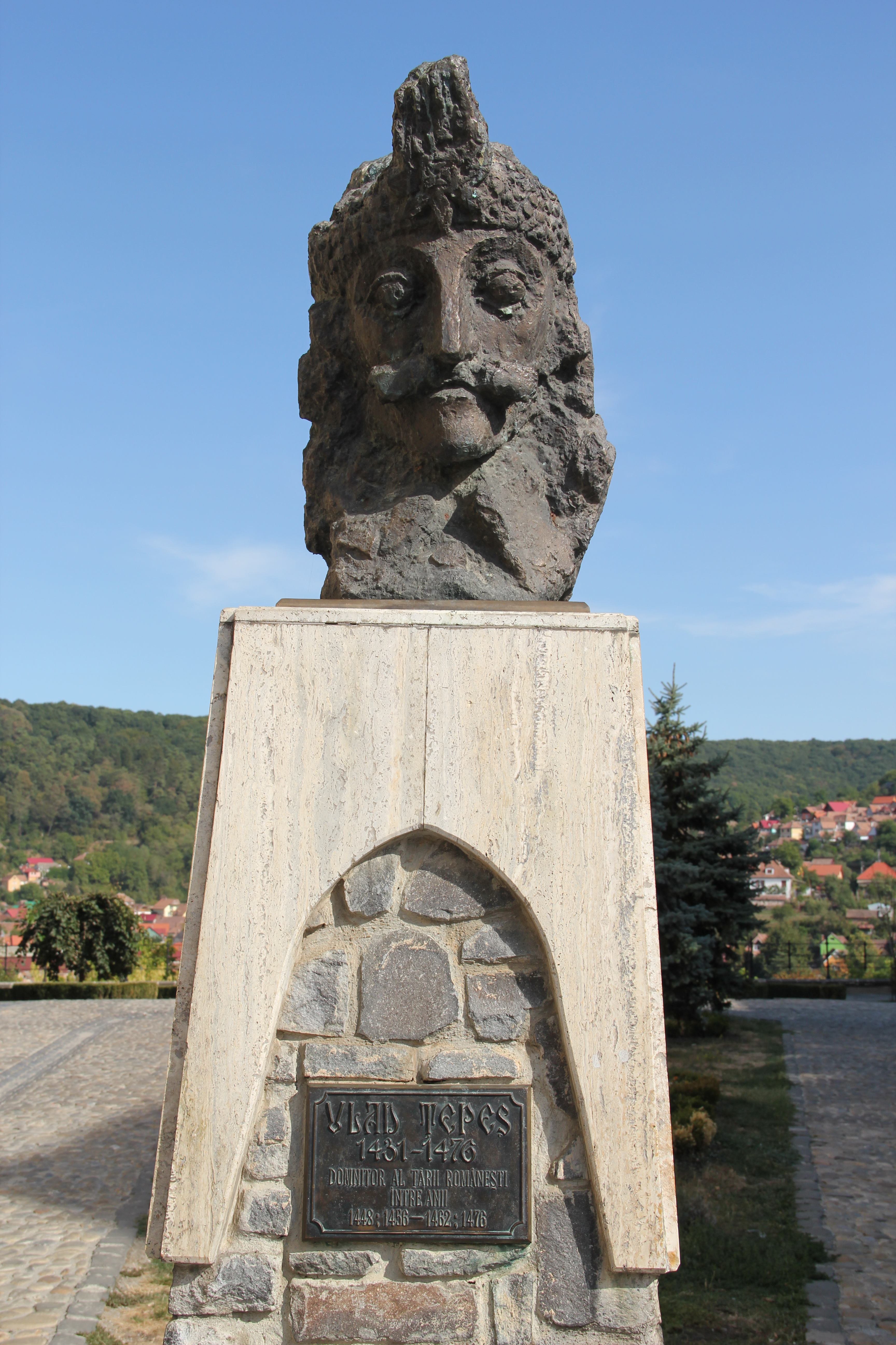 Vlad Ţepeș, Sighișoara